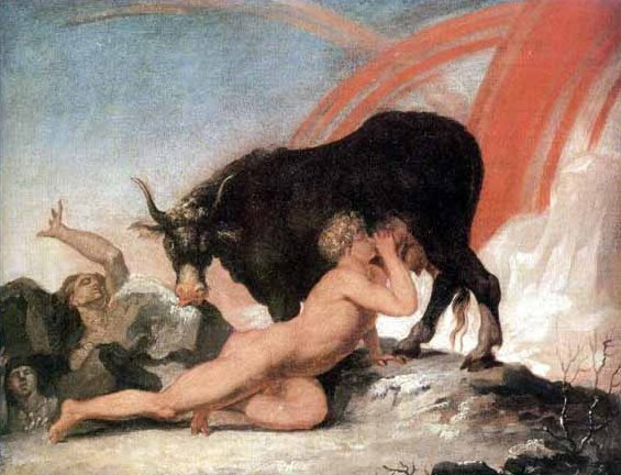 Auðumbla